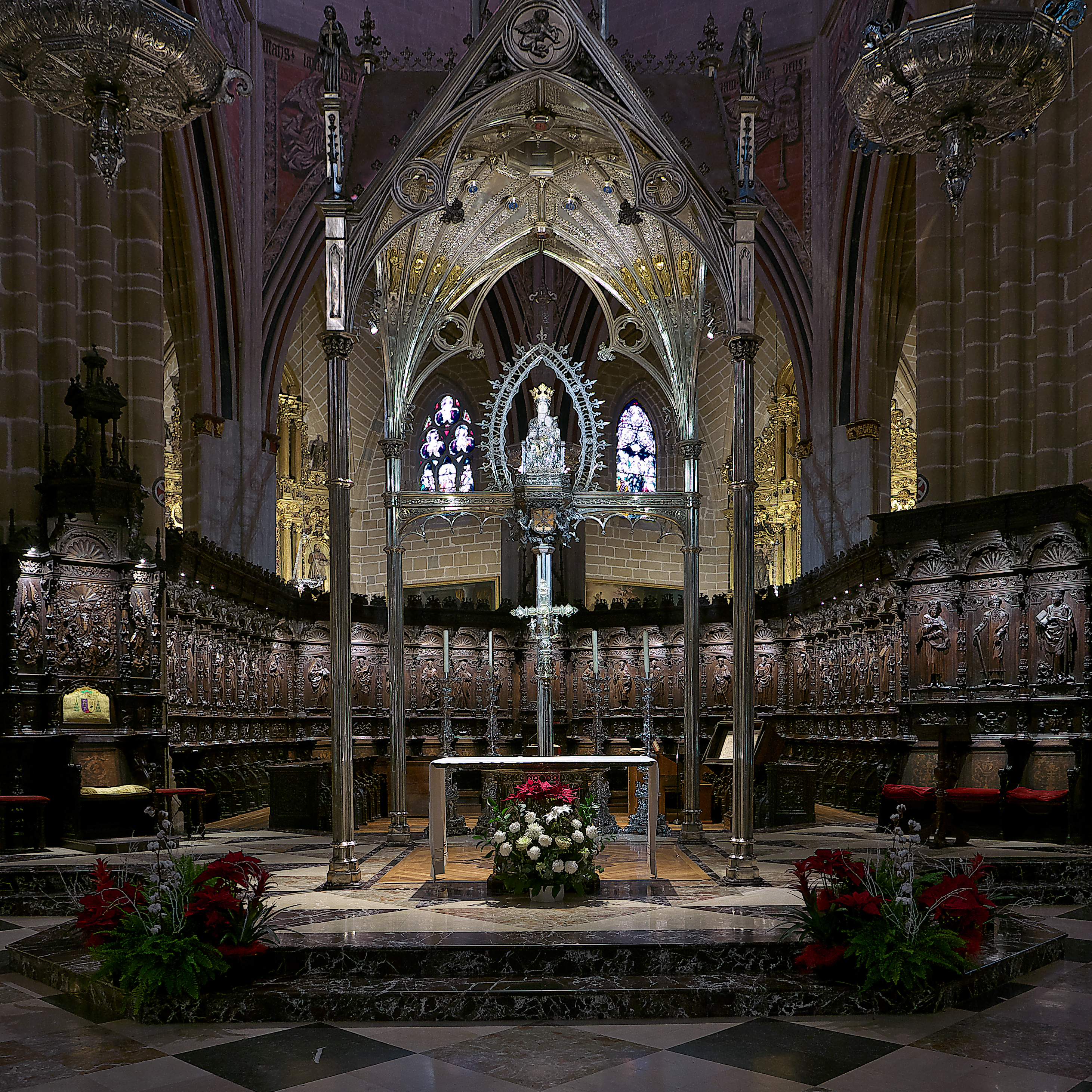 José Yárnoz Larrosa diseña un baldaquino neogótico (1946) para Santa María la Real de Pamplona.